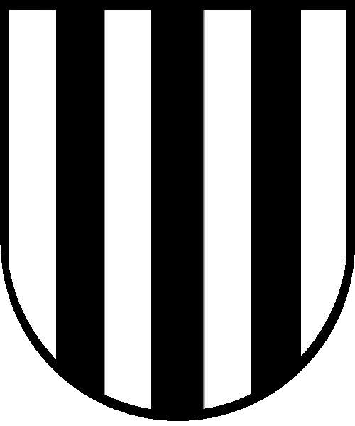 Wappen der Burggrafen von Kirchberg (Kapellendorf) in Silber/Weiß drei schwarze Balken